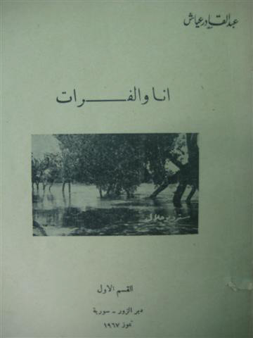 الاستاذ عبد القادر عياش باحث ومؤرخ وأديب وصحفي ومحام، عَشِقَ منطقة وادي الفرات وكرس حياته من أجلها، ومن أجل مدينته "دير الزور" التي أحبها وسرى حبها في دمه حتى أضحت جزءاً لا يتجزأ من كيانه.